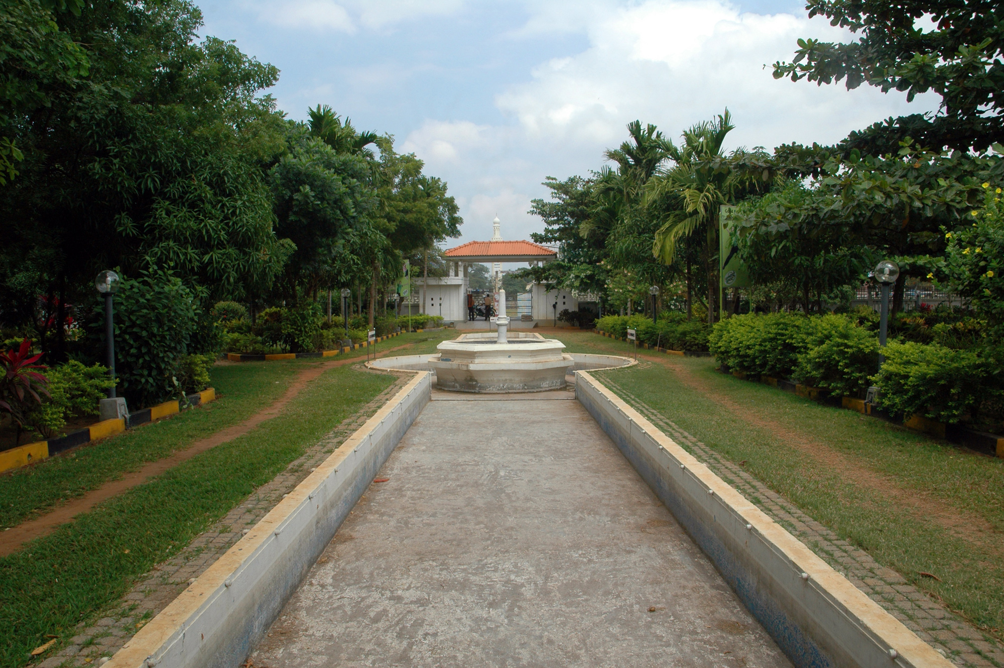 சுப்பிரமணியம் சிறுவர் பூங்கா, யாழ்ப்பாணம்